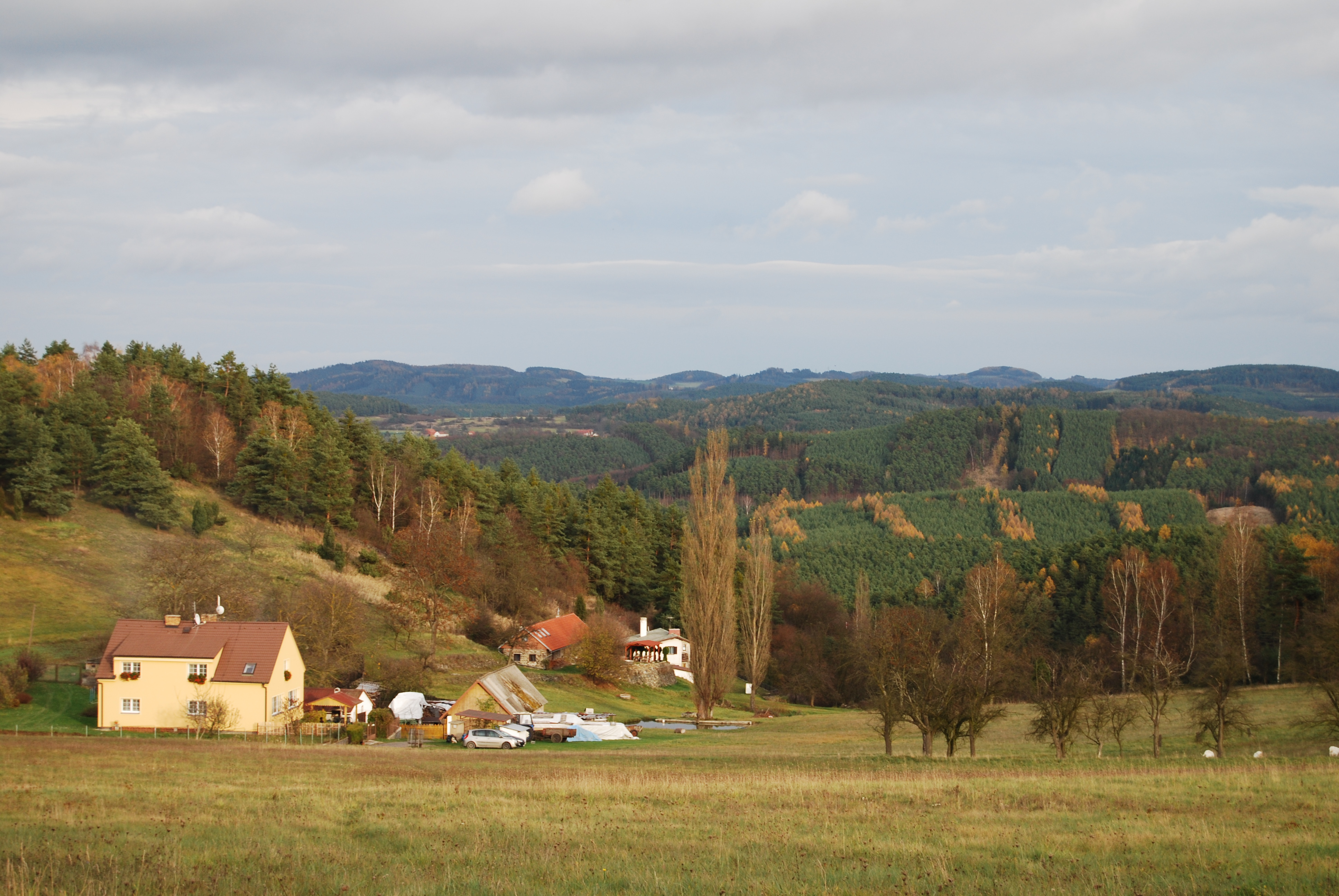 Pohled na okolí. Přední Chlum je část obce Milešov v okrese Příbram. Česká republika. - OpenStreetMap (Info)